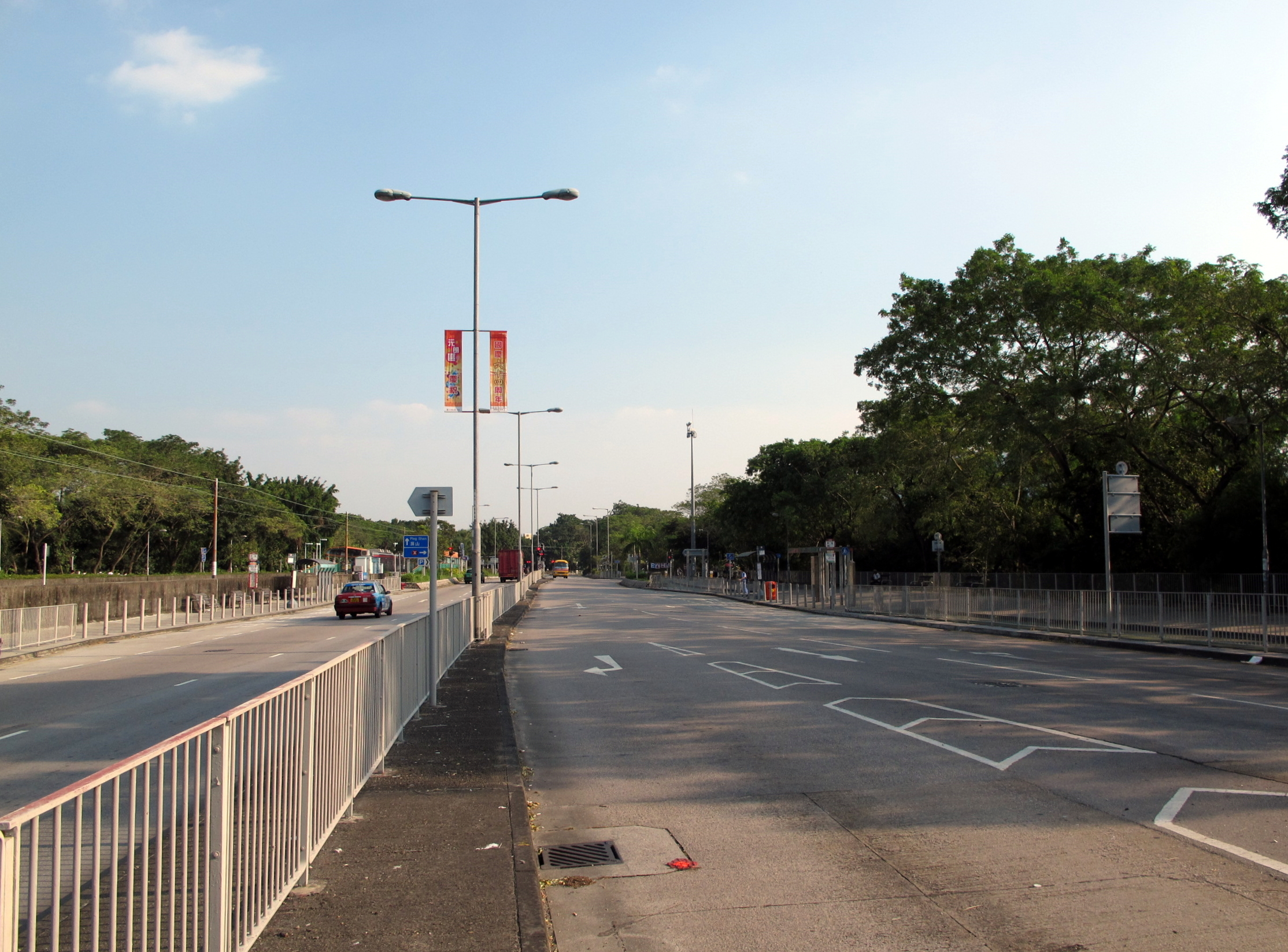 Ping Ha Road